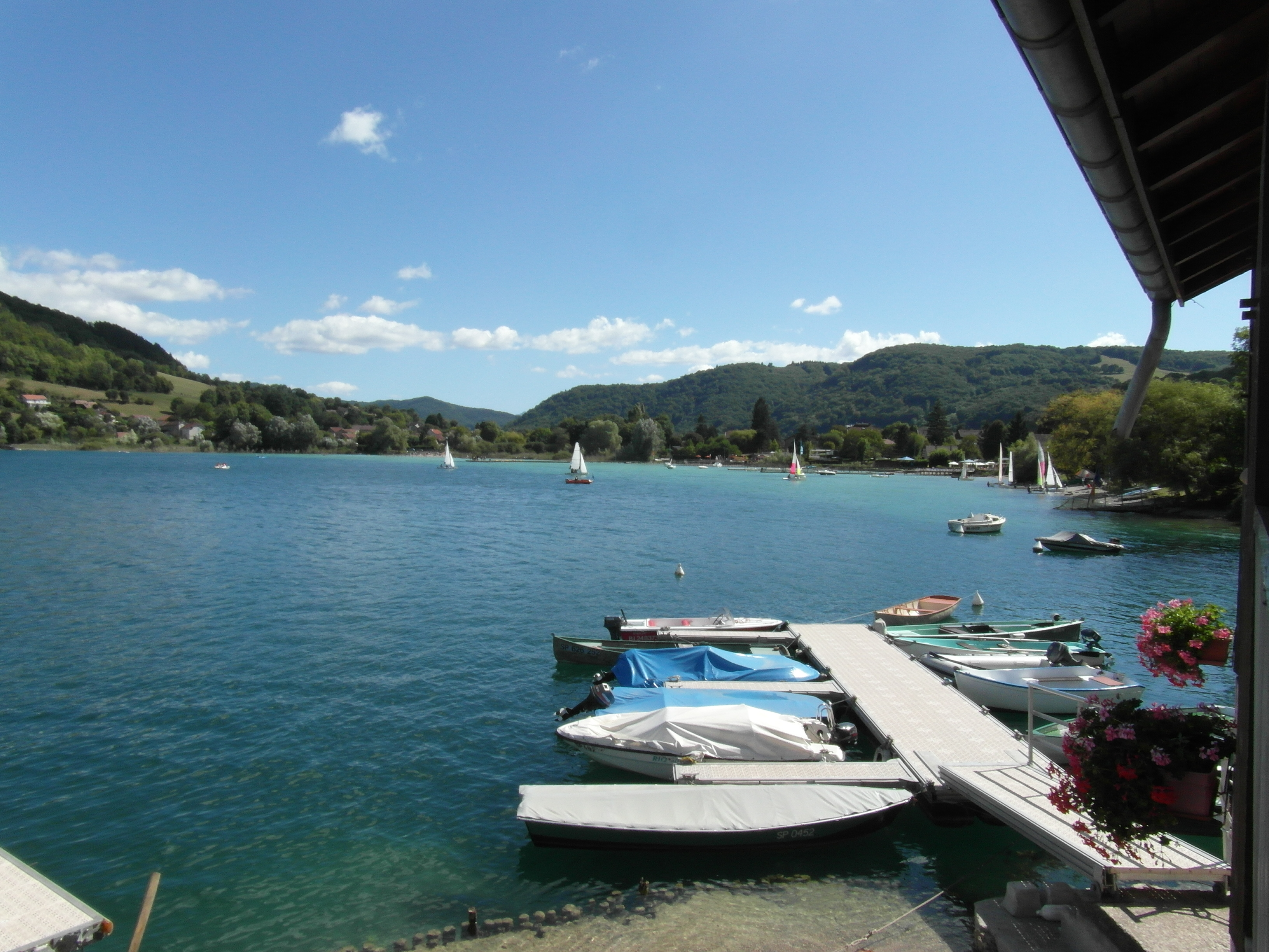 Le lac de Paladru en aout 2012